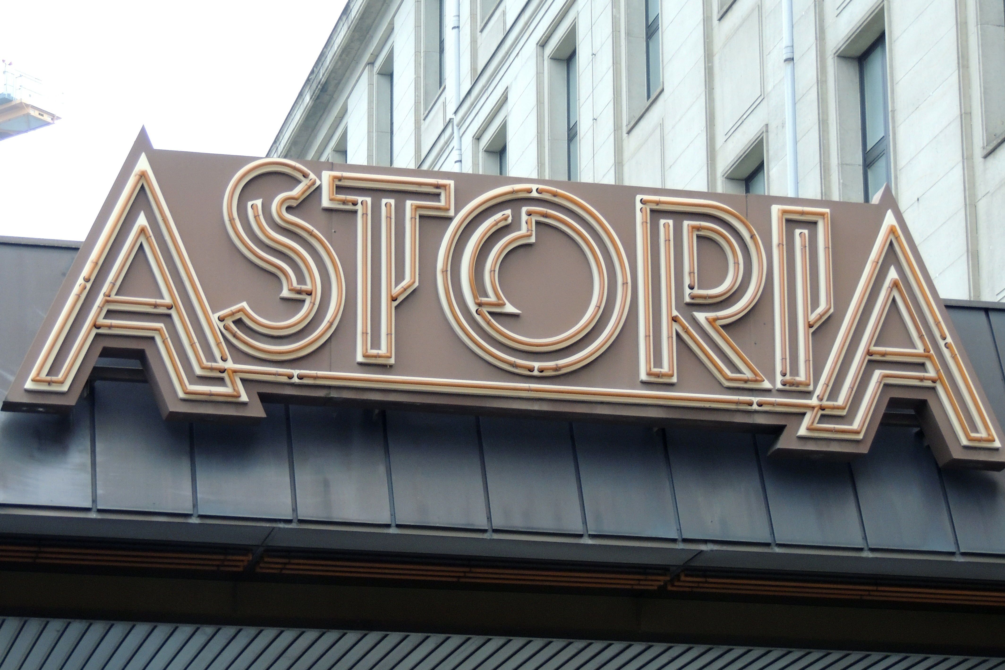 Schriftzug über dem Eingang des Hotels